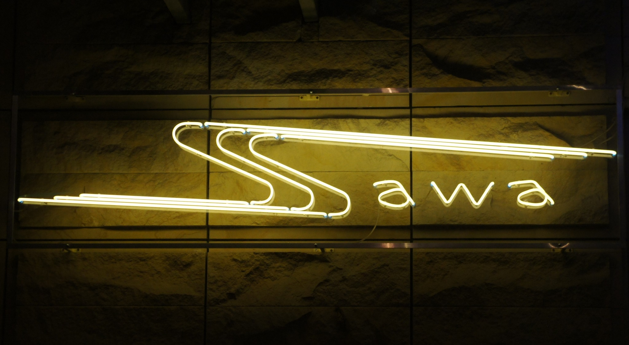 Neon "Sawa" na placu Przymierza w Warszawie.